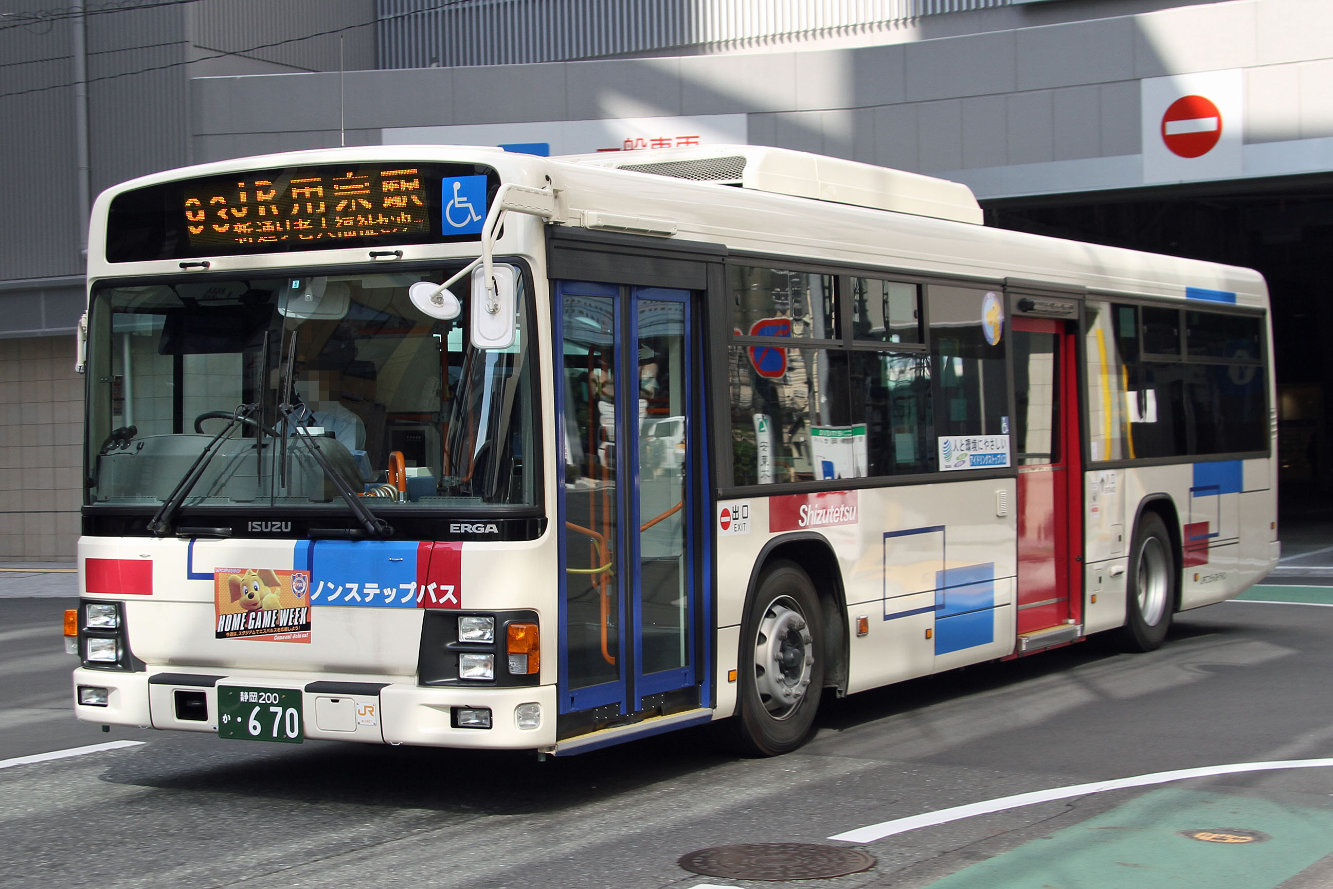 Shizutetsu Justline Car しずてつジャストラインの車両